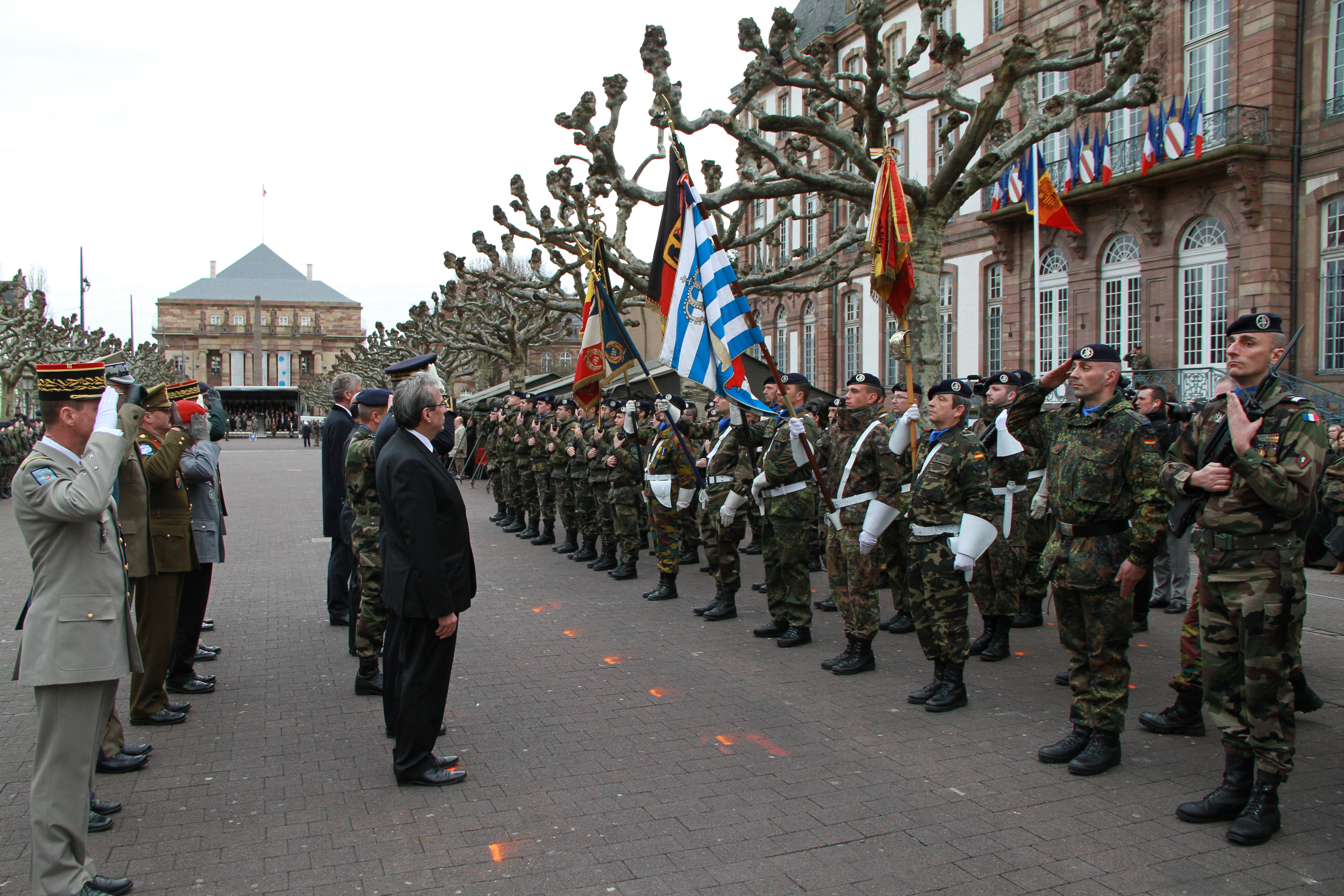 Eurocorps prise d’armes de fin de mission en Afghanistan, place Broglie à Strasbourg 31 janvier 201, en présence de M. Pieter De Crem, ministre belge de la Défense, et de M. Kader Arif, ministre délégué auprès du ministre de la Défense, chargé des Anciens Combattants.